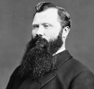 Angus McIsaac, M.P. (Antigonish, N.S.)